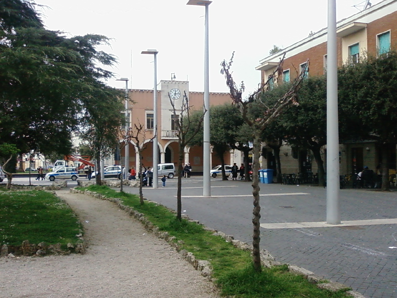 Piazza XIX Marzo e sullo sfondo il Comune Vecchio